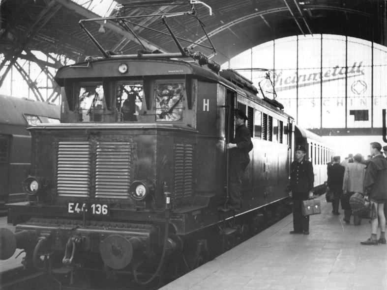 Leipzig, Hauptbahnhof, Lokomotive Typ E44 Zentralbild Zühlsdorf 4.6.1958 Leipzig-Bitterfeld elektrisch Nach einer Probefahrt am 31. Mai wird im Juni der elektrische Zugbetrieb auf der Strecke Leipzig-Bitterfeld dem fahrplanmässigen Verkehr übergeben. Damit ist ein weiterer Teilabschnitt im Elektrifizierungsprogramm des mitteldeutschen Raumes fertiggestellt, der der Forderung des zweiten Fünfjahrplanes, die Transportleistungen der Deutschen Reichsbahn auf 132 Prozent zu steigern, gerecht wird. UBz: Die Lok vom Typ E 44 nach der Probefahrt von Bitterfeld nach Leipzig am 31.5. im Leipziger Hauptbahnhof.